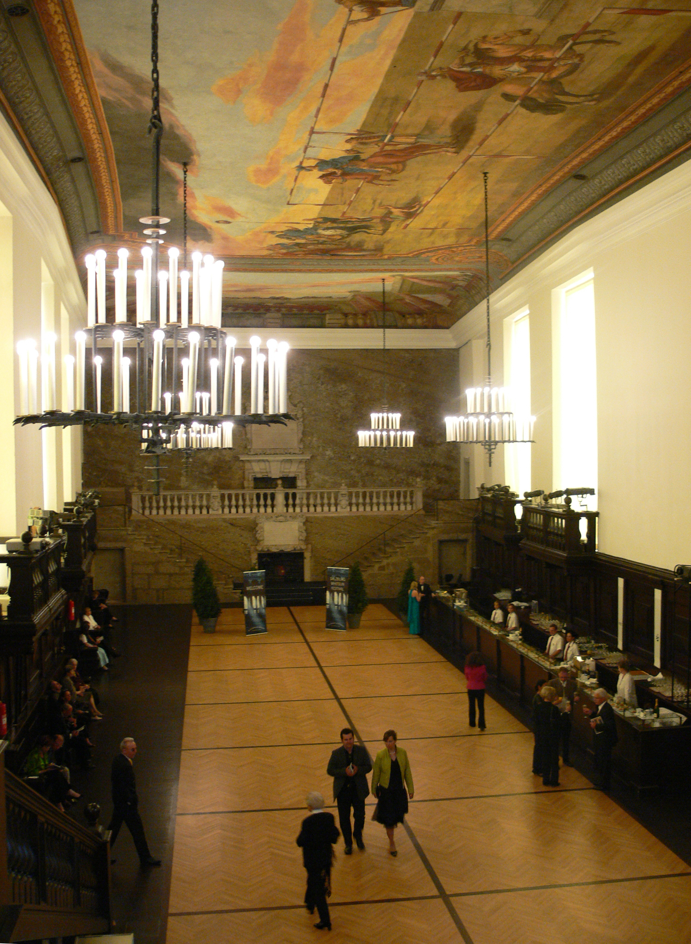 Salzburg, Festspielhauskomplex, Karl-Böhm-Saal (früher Stadtsaal), errichtet als Winterreitschule